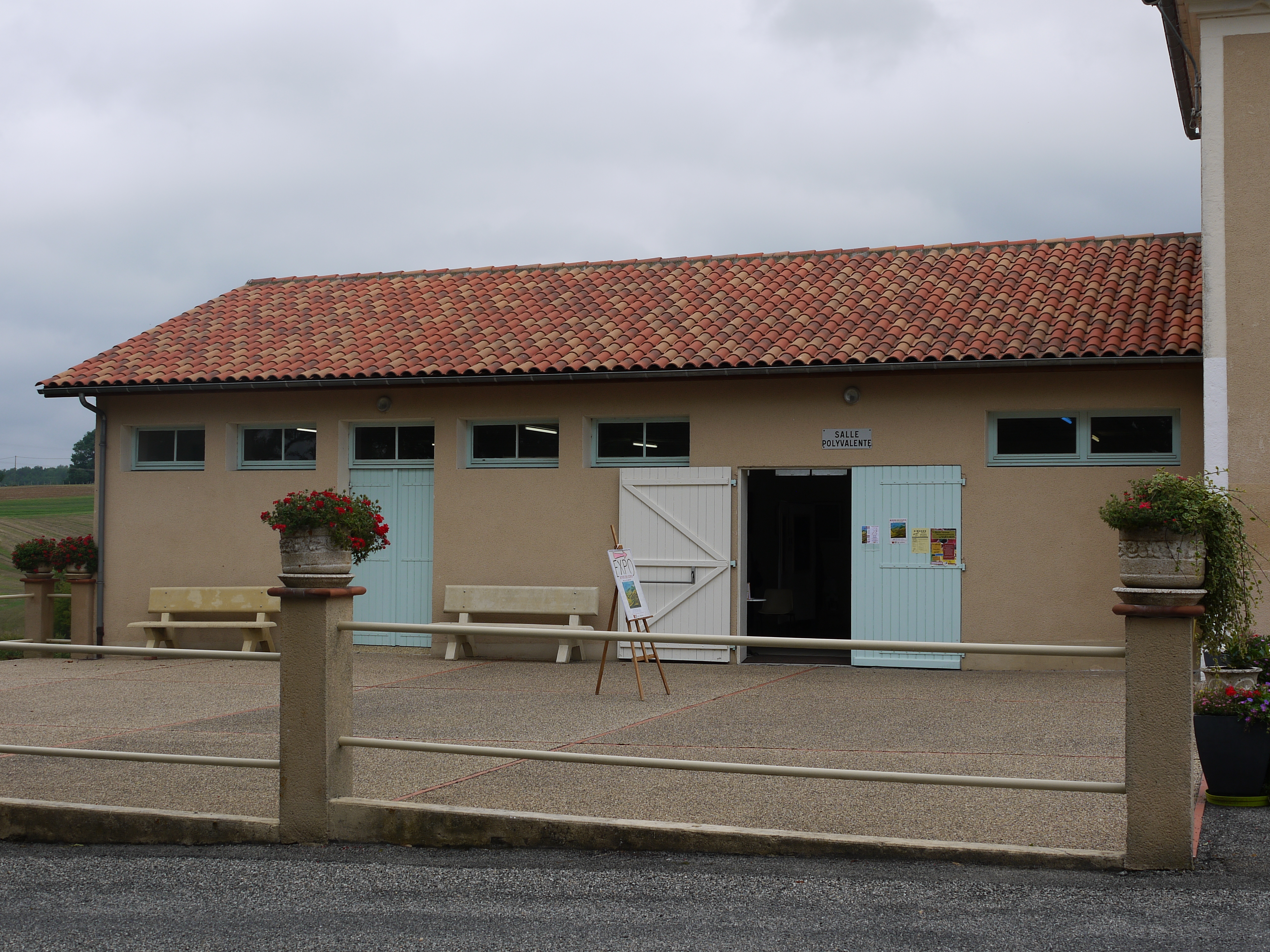 La salle polyvalente de Sémézies